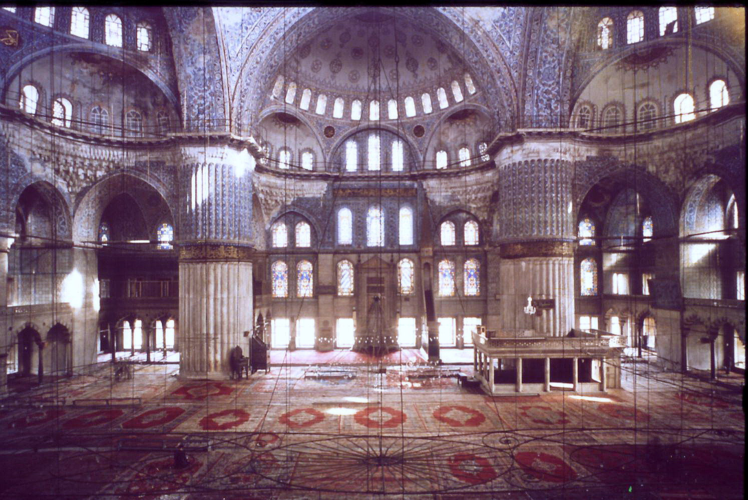 mosquée Ahmet (Istanbul)